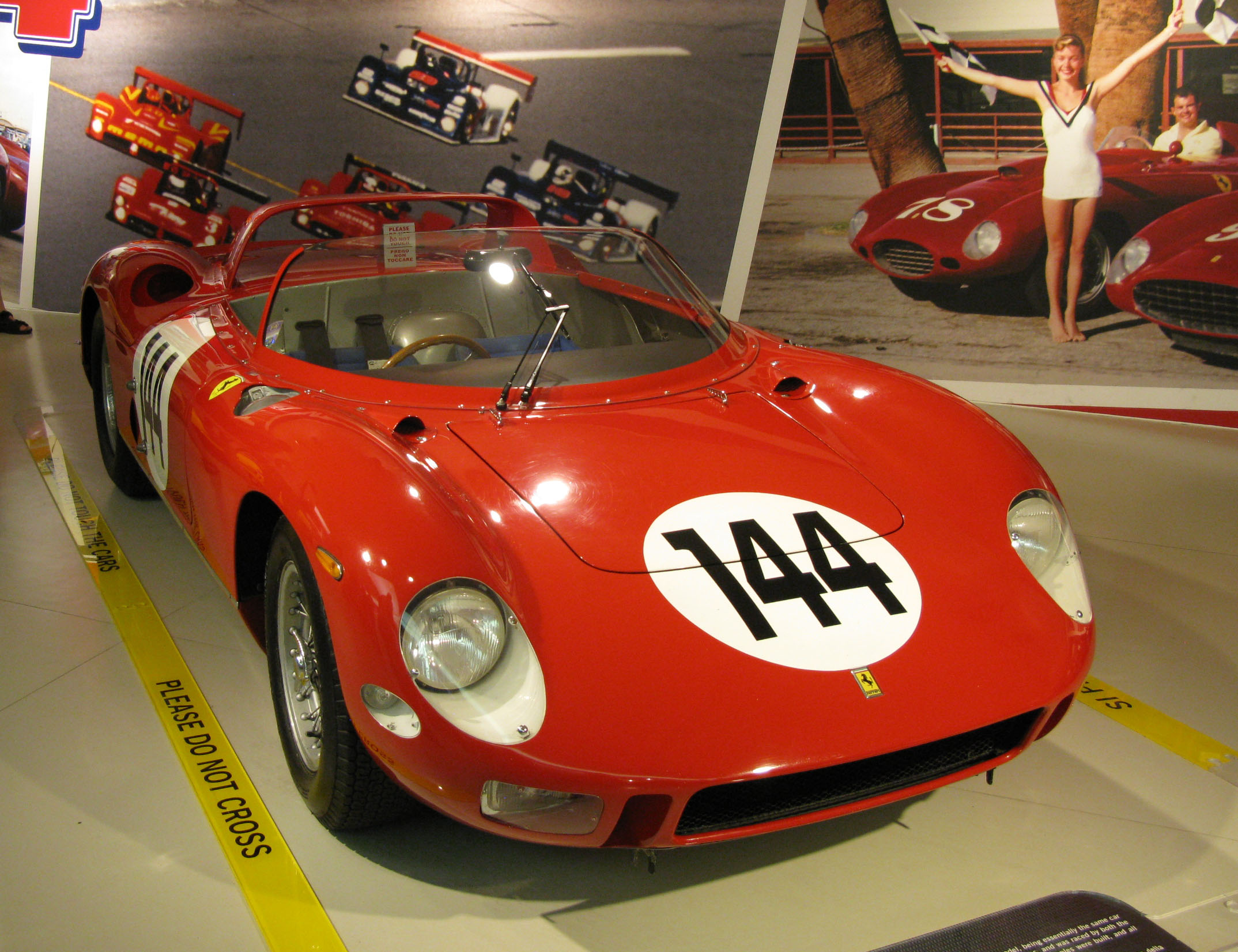 1964 Ferrari 330 P s/n 0820 at the Museo Ferrari on 17 July 2014.